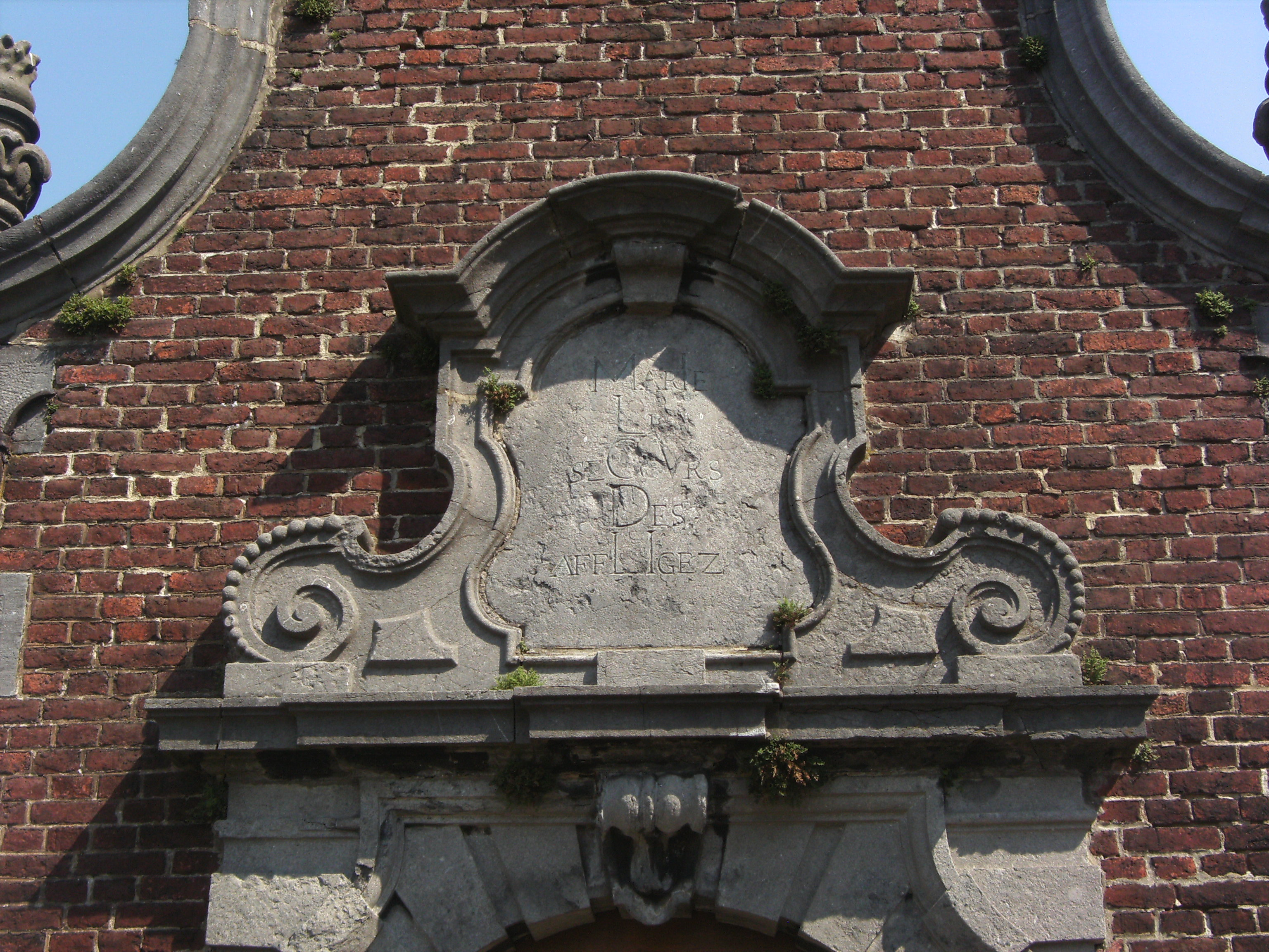 Jumet (Charleroi - Belgique) - Chapelle Notre-Dame des Affligés (XVIIe - XVIIIe siècle) - chronogramme : « MarIe Le seCoVrs Des affLIgéz » (1707)